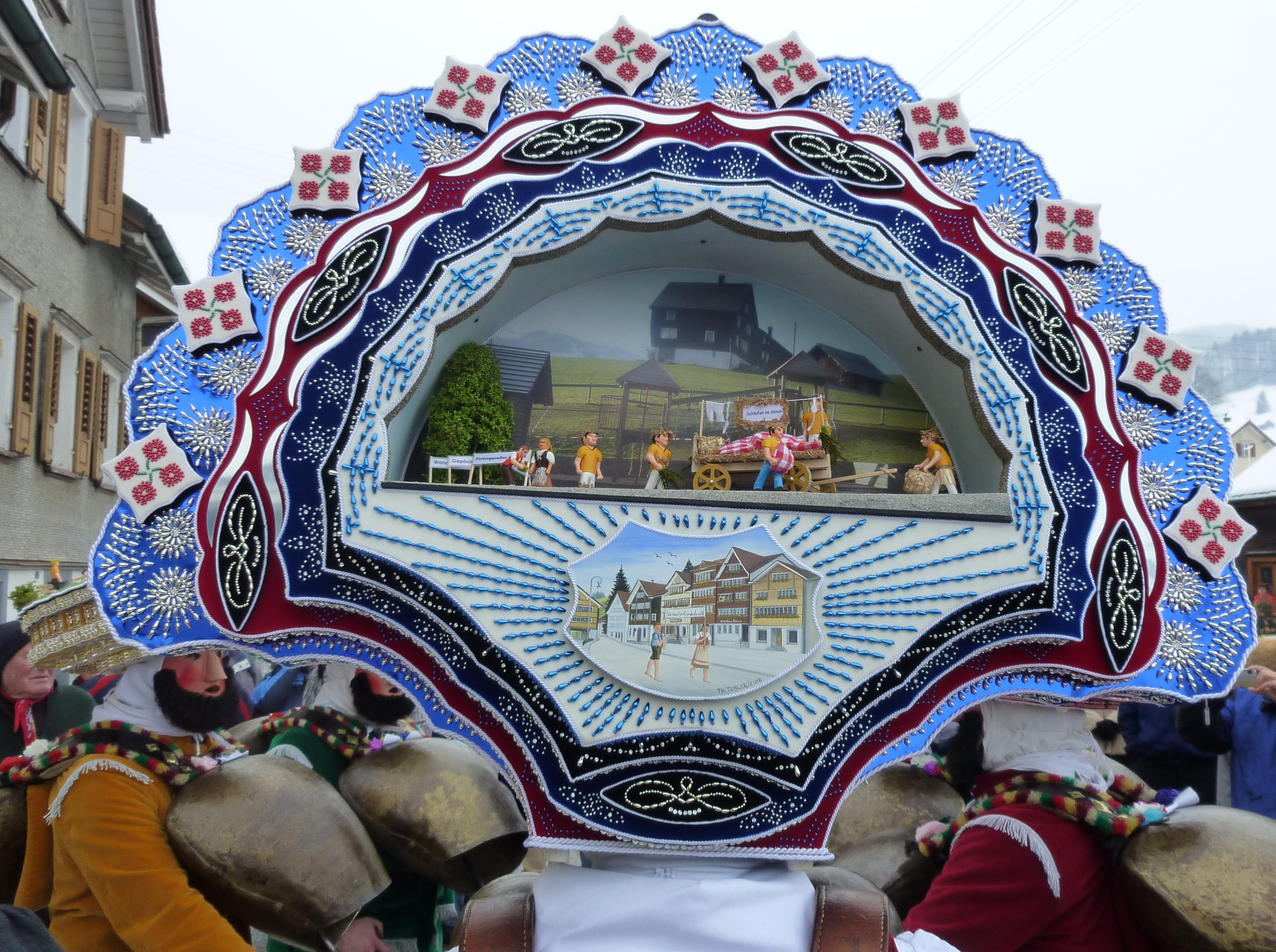 Schöner Silvesterklaus in Urnäsch, Detail (Kanton Appenzell, Schweiz)